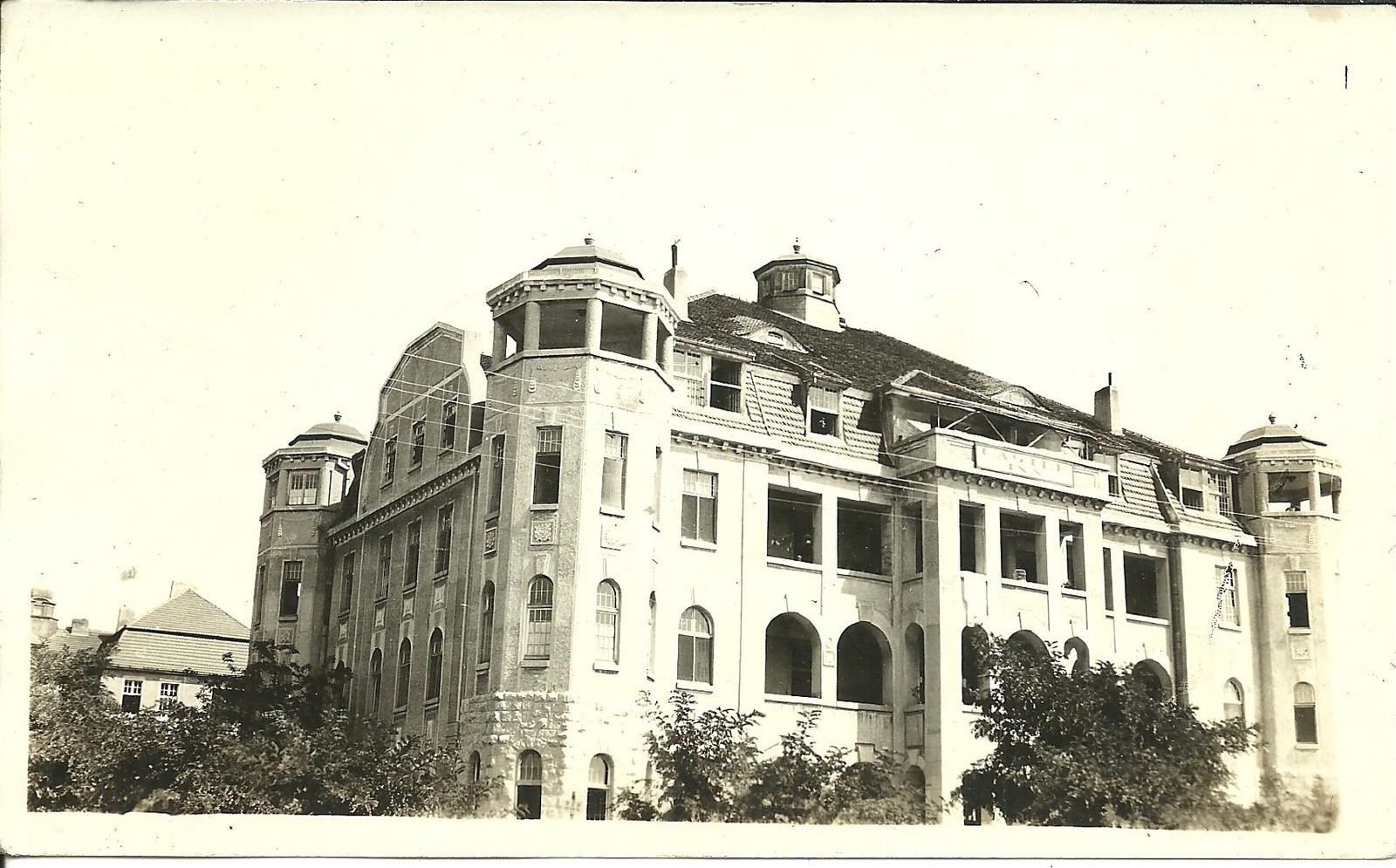 青岛Castle Inn